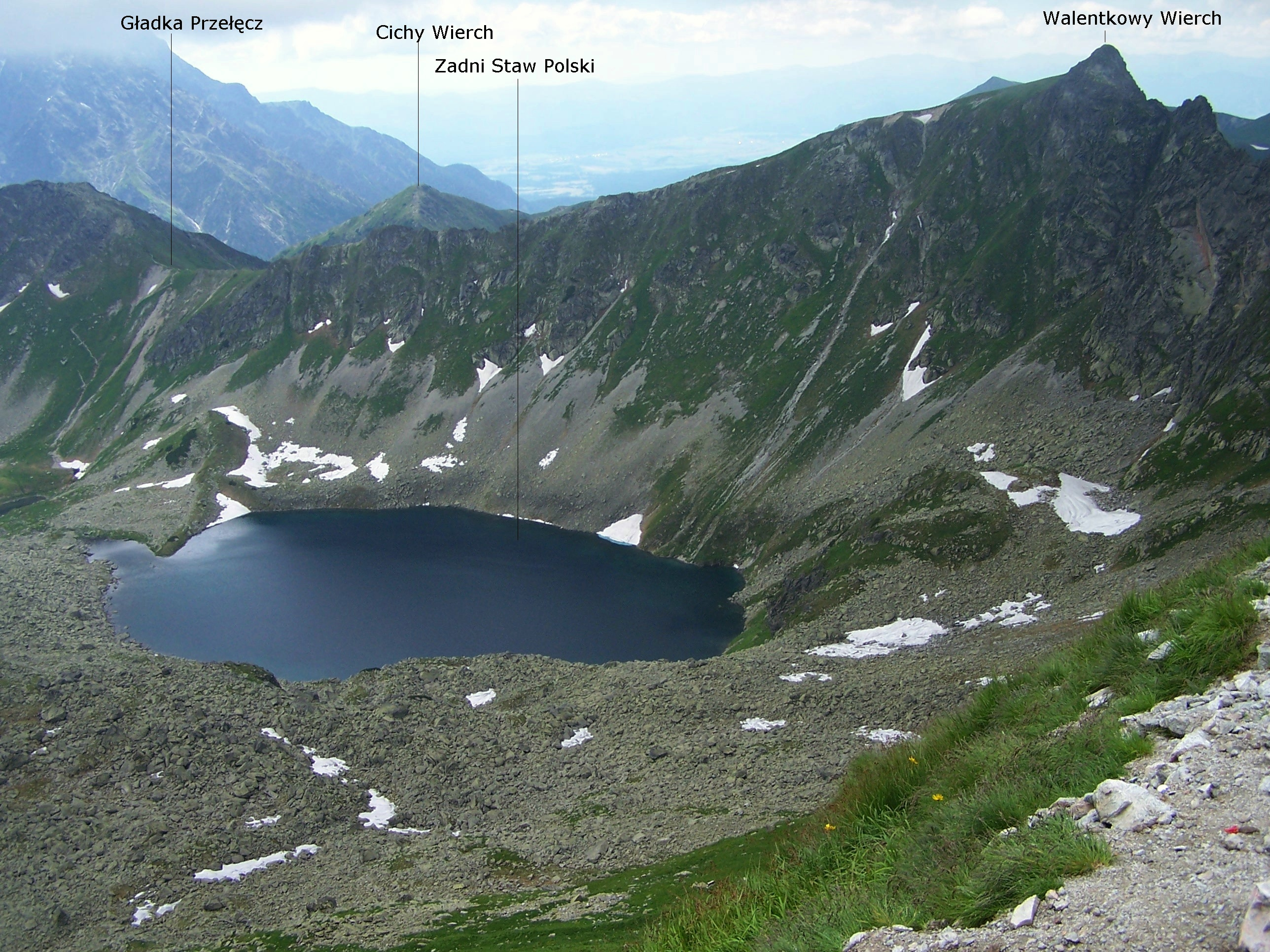 Gładka Przełęcz